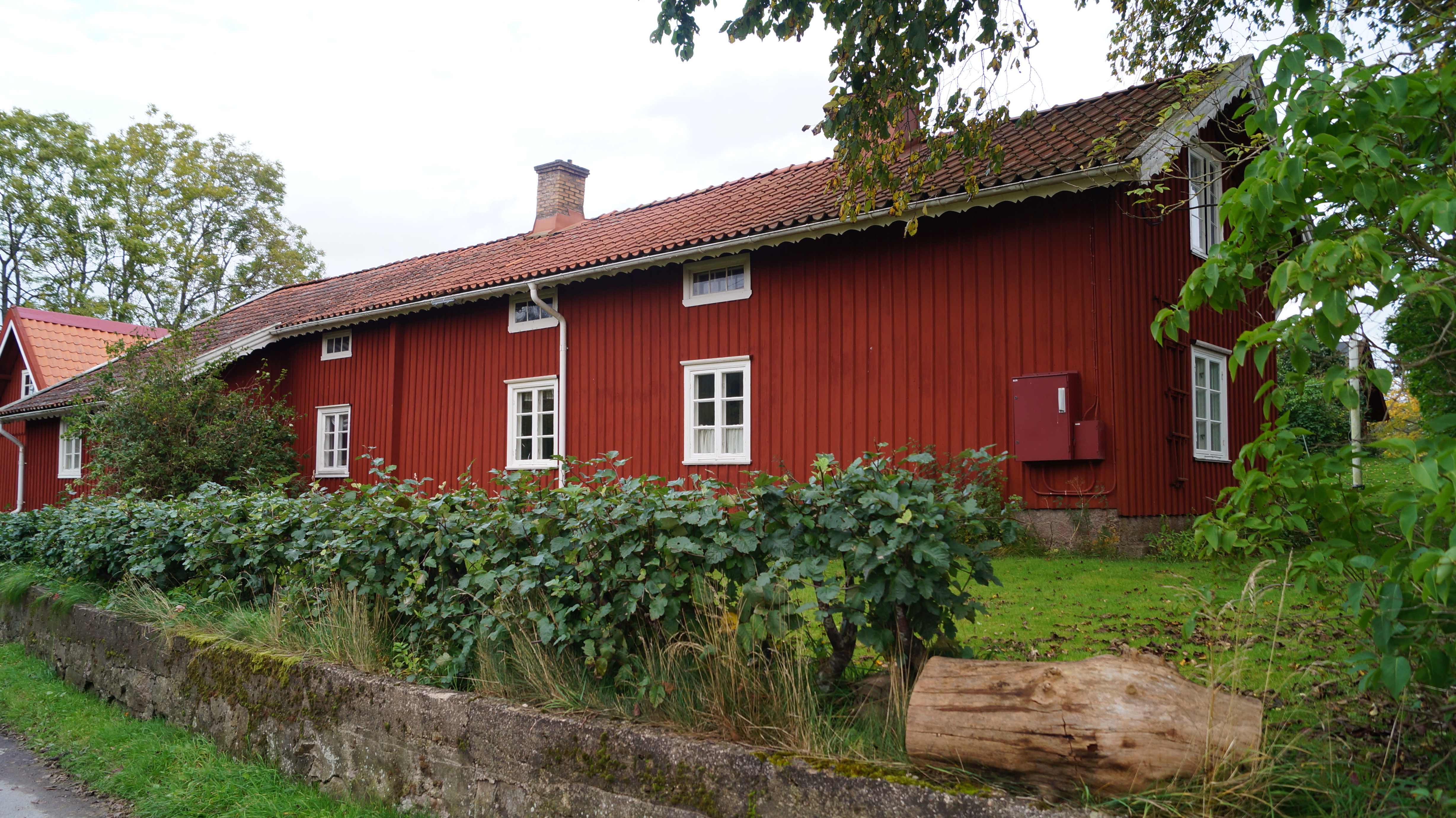 Skändla sörgård (Tuve 3:19 och del av Tuve 42:4) Hembygdsgård